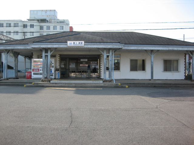 鼓ヶ浦駅